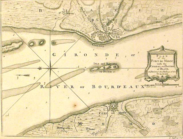 Vue de l'île Paté avec les fortifications de Vauban.